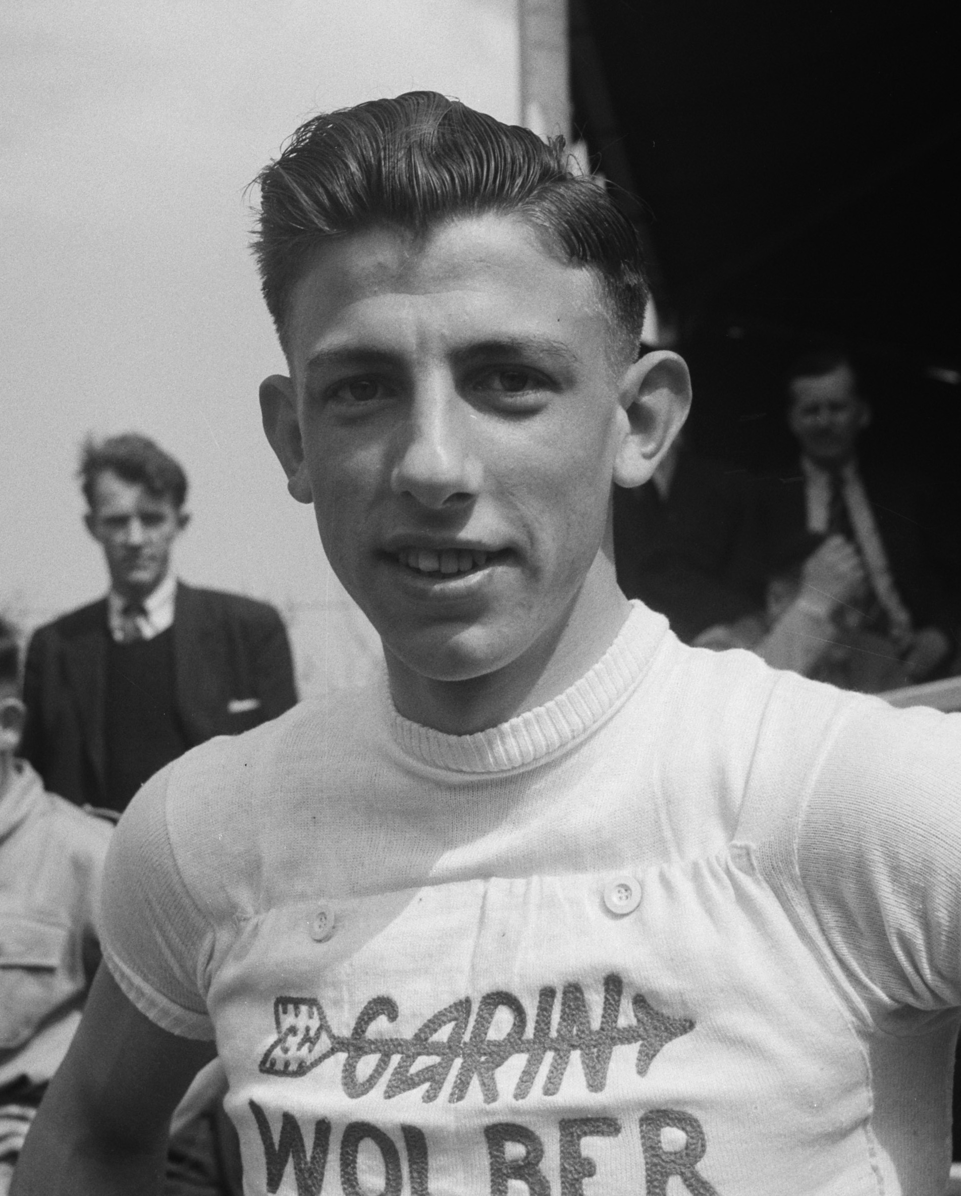 Thijs Roks